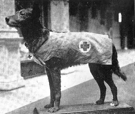 Der Postenhung "Romé"